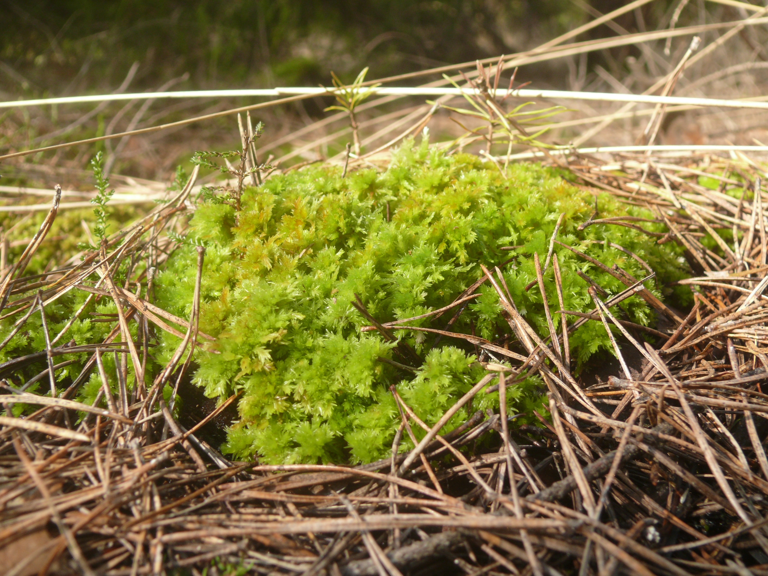 Sphagnum compactum, Rangau, Bayern